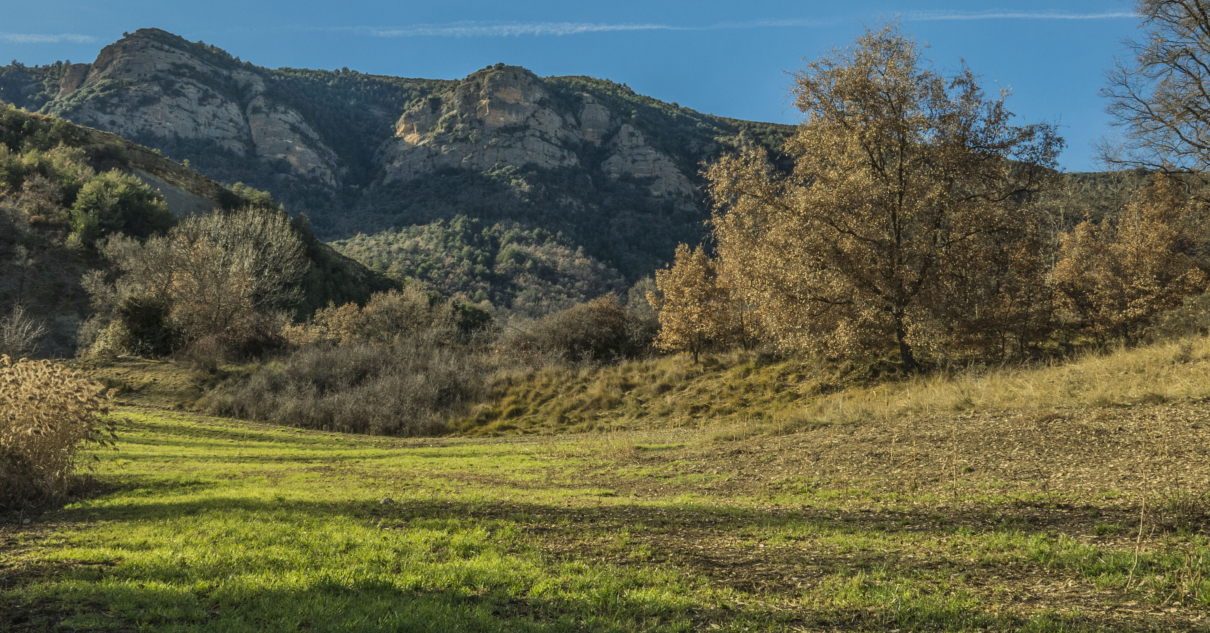 Serra entre l'interfluvi Cinca-Isàvena, disposada en direcció NW-SE, i altures que oscil·len entre els 1.420 de la Serra de Esdolomada i els 1.401 del Morrón més alt de Güel.